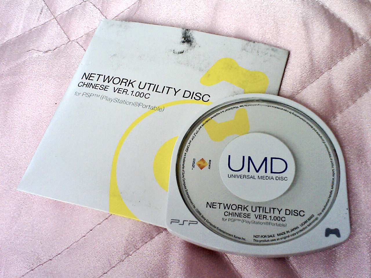 Information |A= 網路UMD |B= 拍攝 |C= 2008/2/9 |D= :zh:User:阿貴|把ㄅㄨ |E= |F=